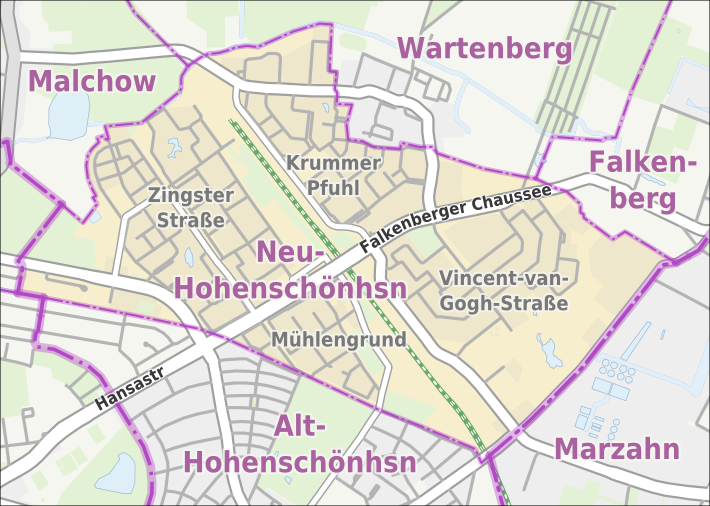 Übersichtskarte der Straßen und Ortslagen in Berlin-Neu-Hohenschönhausen